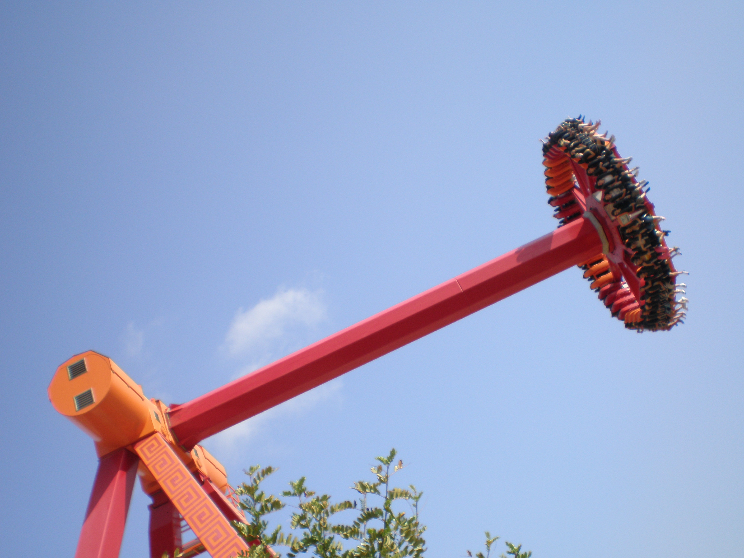 Synkope, al seu punt més alt